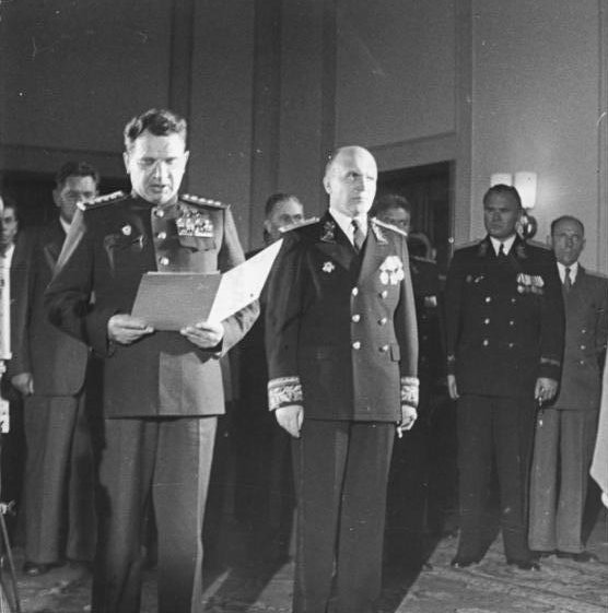 ADN-ZB/SNB Gründung der Deutschen Demokratischen Republik am 7.10.1949. Armeegeneral W.J. Tschuikow empfing am 10.10.1949 in Berlin-Karlshorst das Präsidium der Provisorischen Volkskammer der Deutschen Demokratischen Republik und den Ministerpräsidenten Otto Grotewohl in Anwesenheit des Außerordentlichen Botschafters der UdSSR in Deutschland W.S. Semjonow. UBz: Armeegeneral W.J. Tschuikow verliest die Erklärung, rechts neben ihm W.S. Semjonow. 4153-49